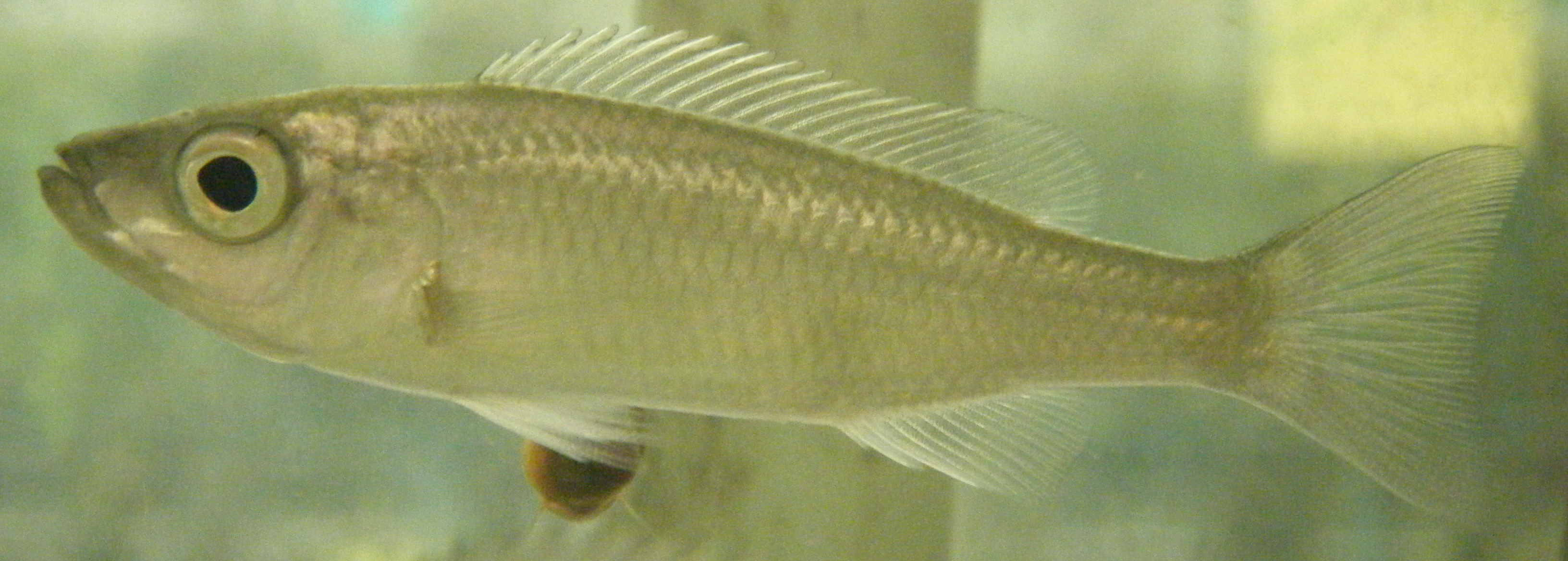 Diplotaxodon, lab bred